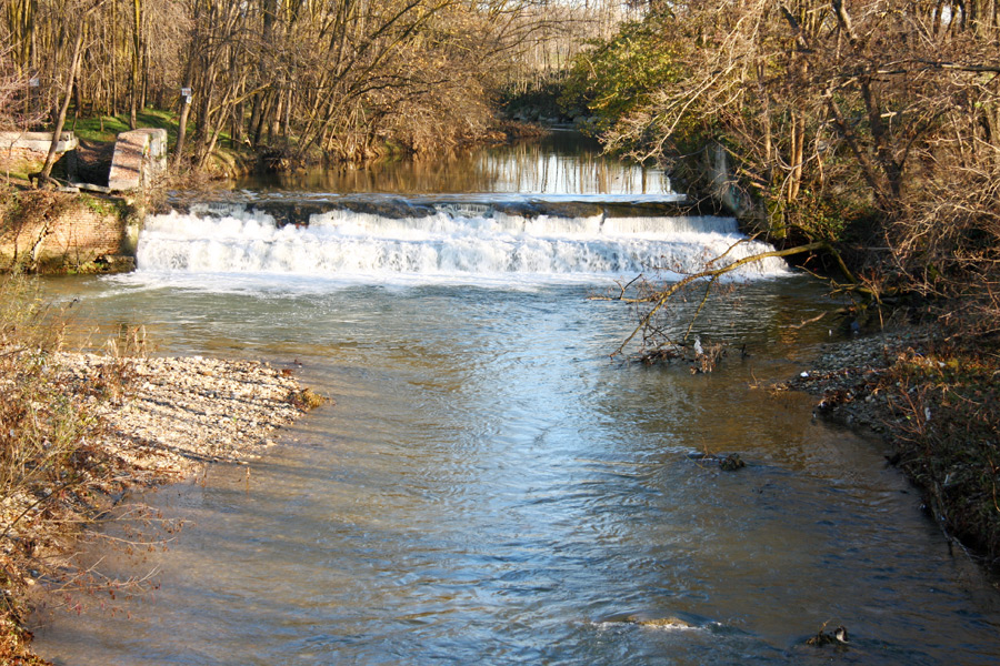 Un tratto del torrente Terdoppio nei pressi della Badia di Dulzago, Bellinzago Novarese (NO)